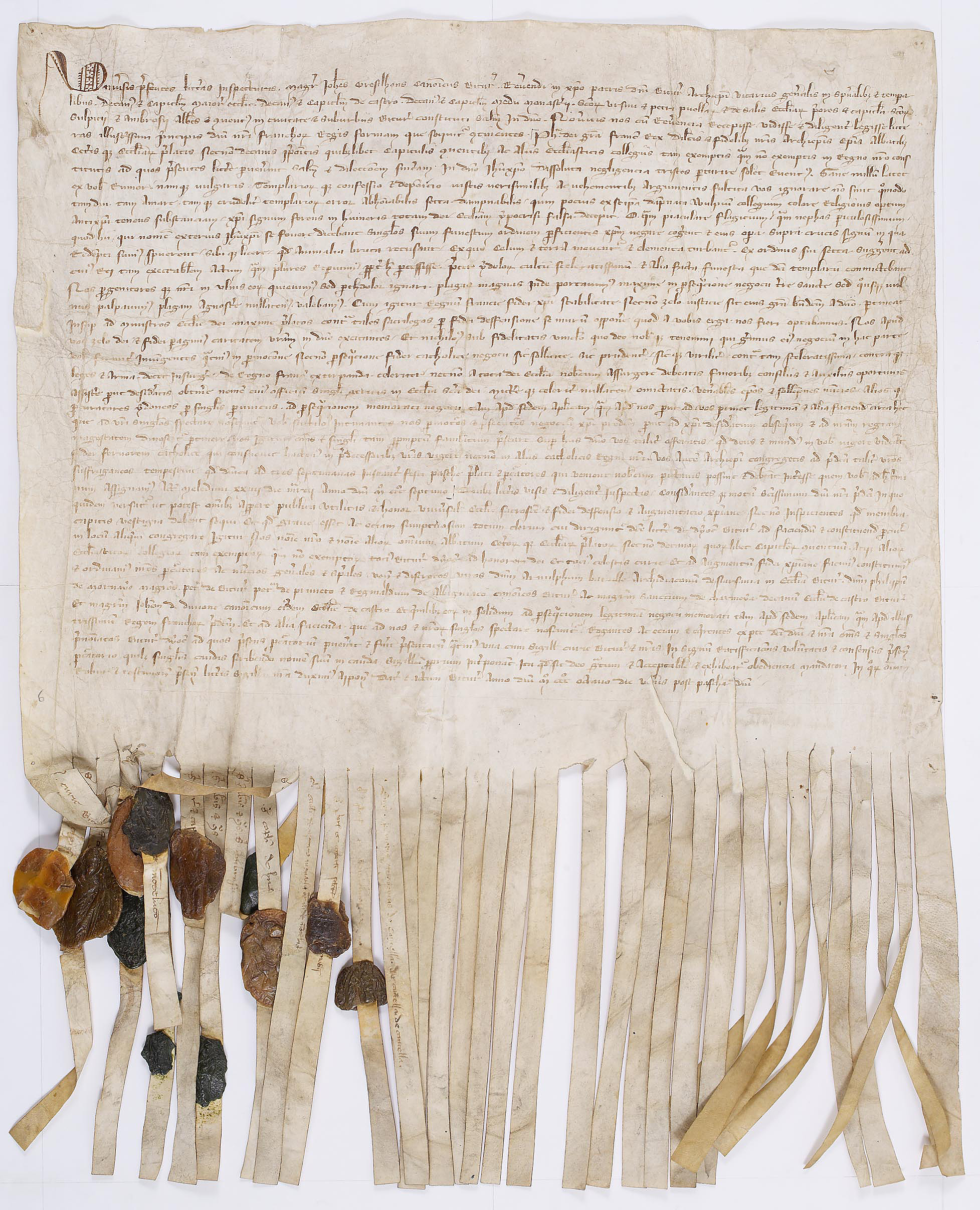 Charte de chanoines du diocèse de Bourges désignant ses députés aux états généraux convoqués par Philippe le Bel pour juger l'ordre du Temple. Acte en latin scellé de plusieurs sceaux sur queue de parchemin, donné à Bourges le 19 avril 1308